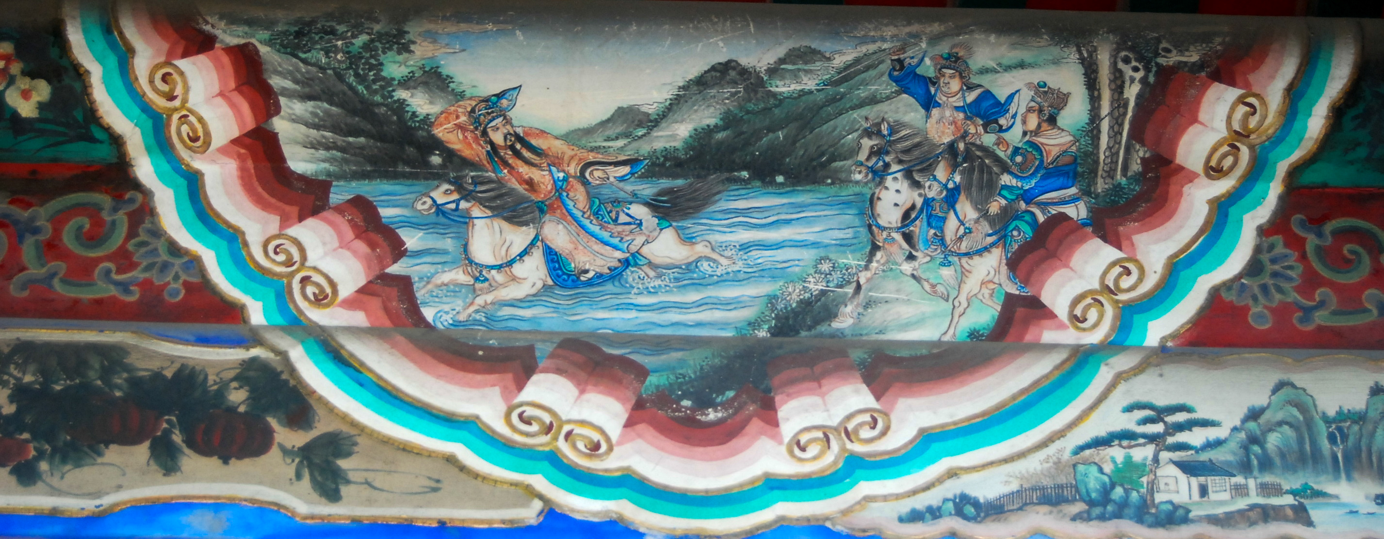 Lưu Bị nhảy lên ngựa vượt suối - Di Hòa Viên